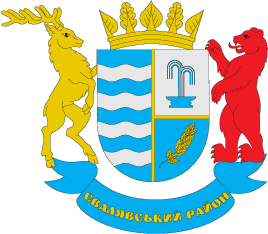 Герб Свалявського району